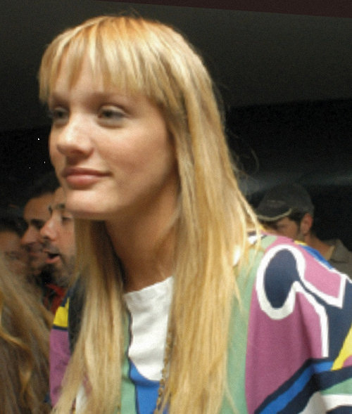 Brazilian MTV VJ Carla Lamarca